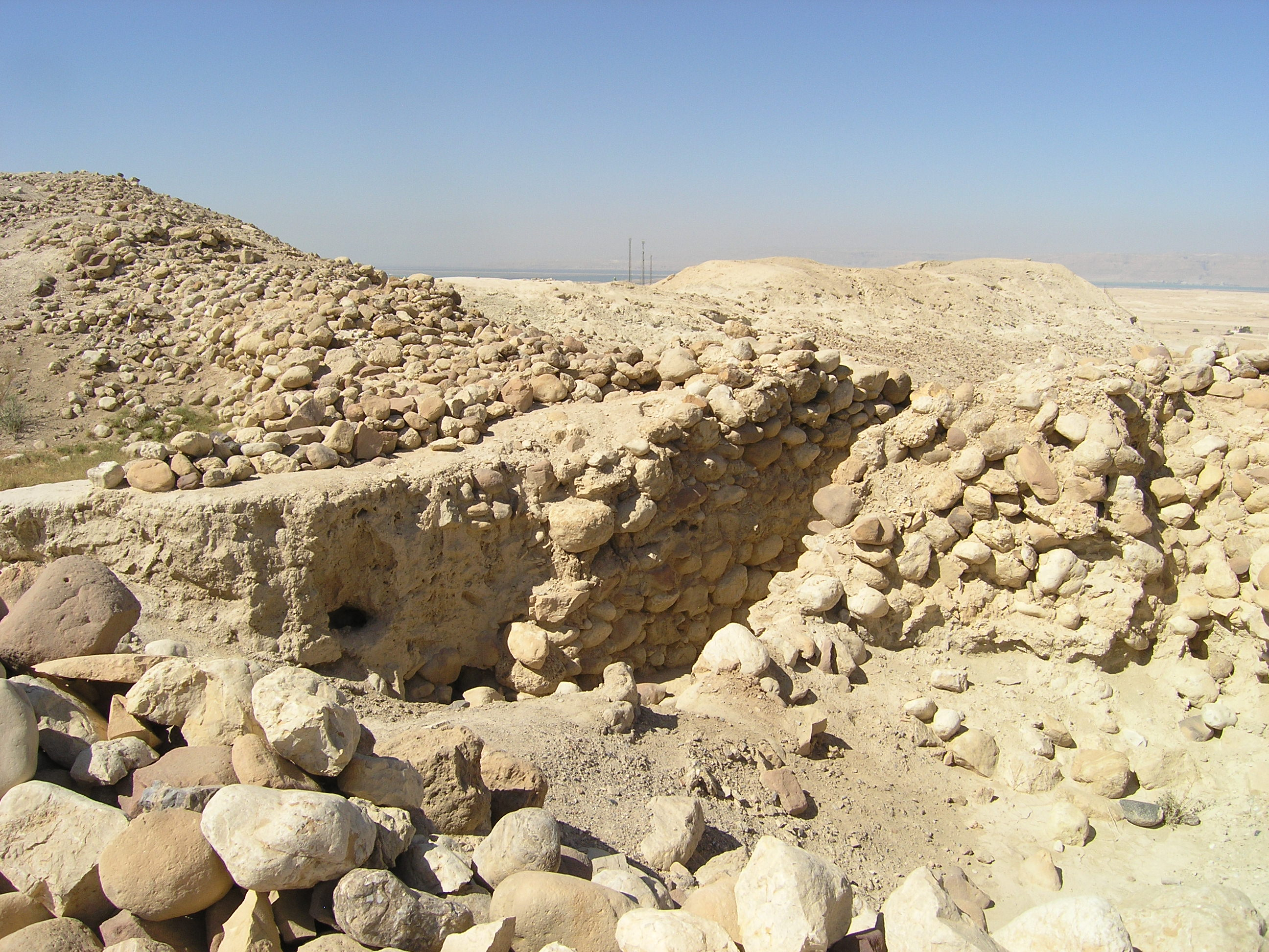 Bab edh-Dhra, Mauerreste der bronzezeitlichen Stadt